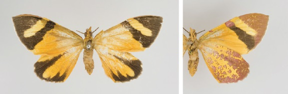 Hagnagora clustimena